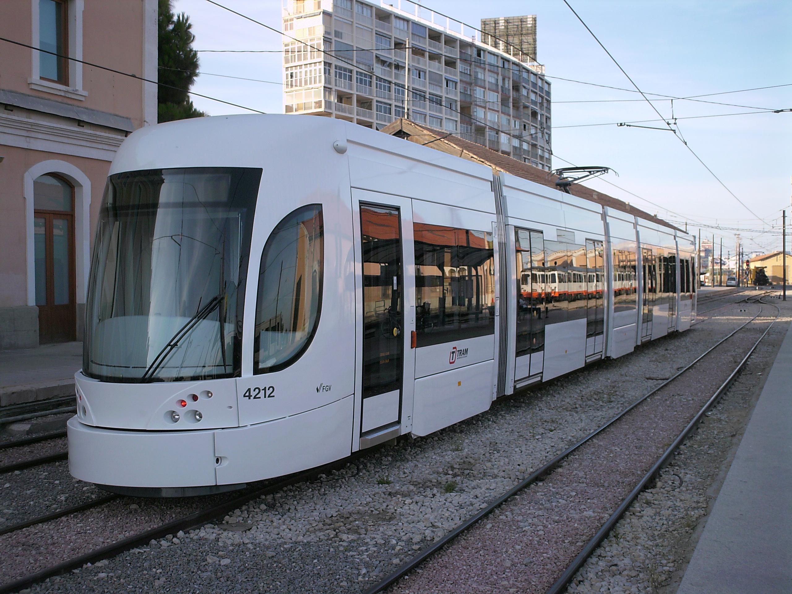 Flexity Outlook der Linie L4 der Stadtbahn Alicante an der aktuellen Endstation Albufereta; Flexity Outlook de la línea L4 del TRAM Metropolità d'Alacant en la actual estación final Albufereta